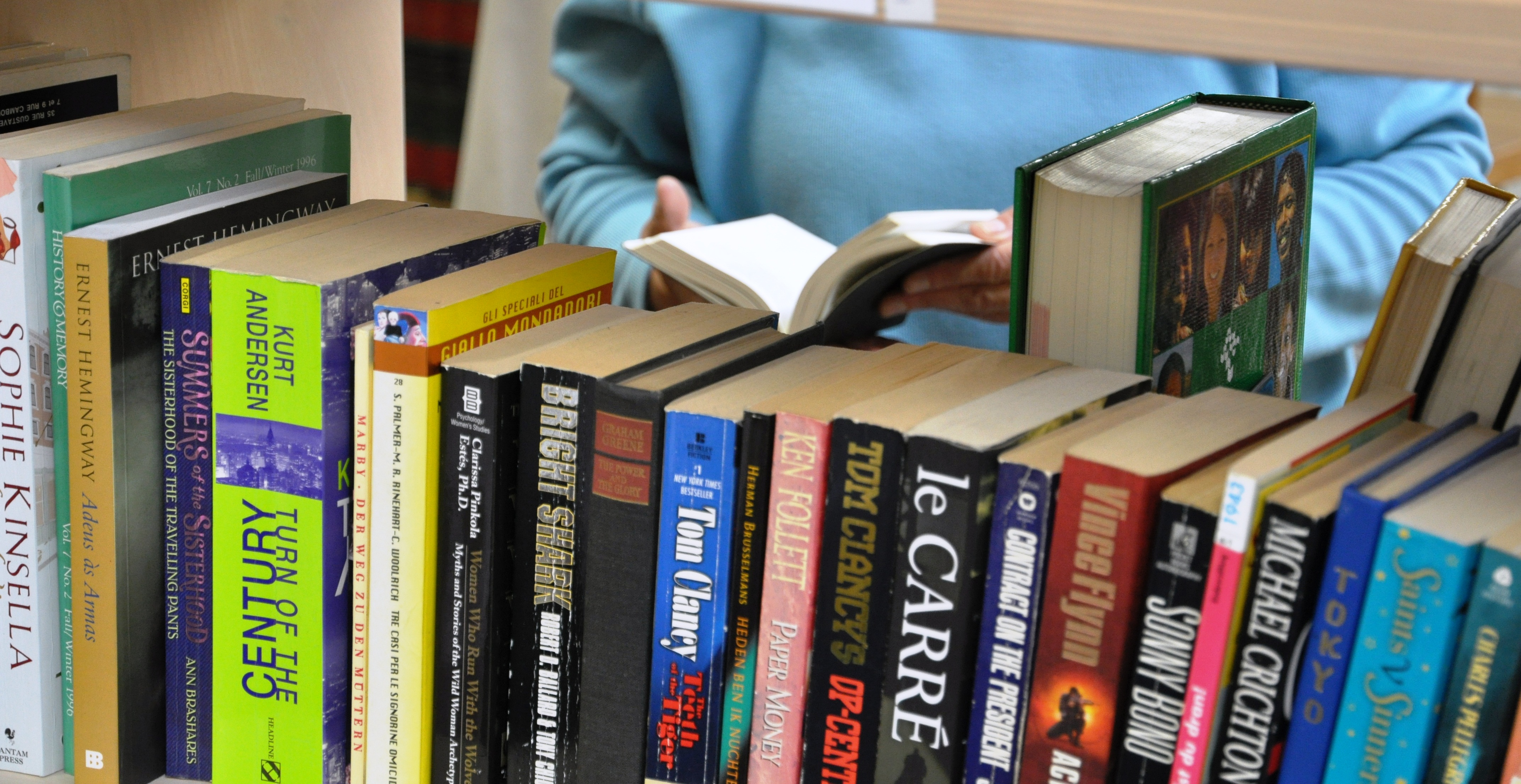 Boeken in de kringloopwinkel in Woerden.